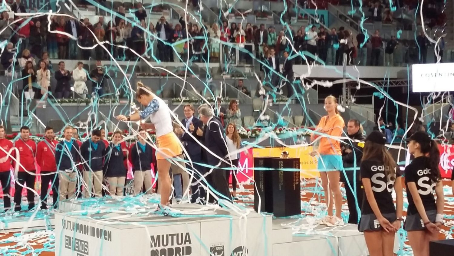 La primera teniente de alcalde del Ayuntamiento de Madrid y concejala del Área de Equidad, Derechos Sociales y Empleo, Marta Higueras, ha sido la encargada de entregar ayer el premio a la subcampeona del Mutua Madrid Open femenino. La triunfadora, la rumana Simona Halep, revalidó su título Mutua Madrid Open en la Caja Mágica ante la francesa Kristina Mladenovic.